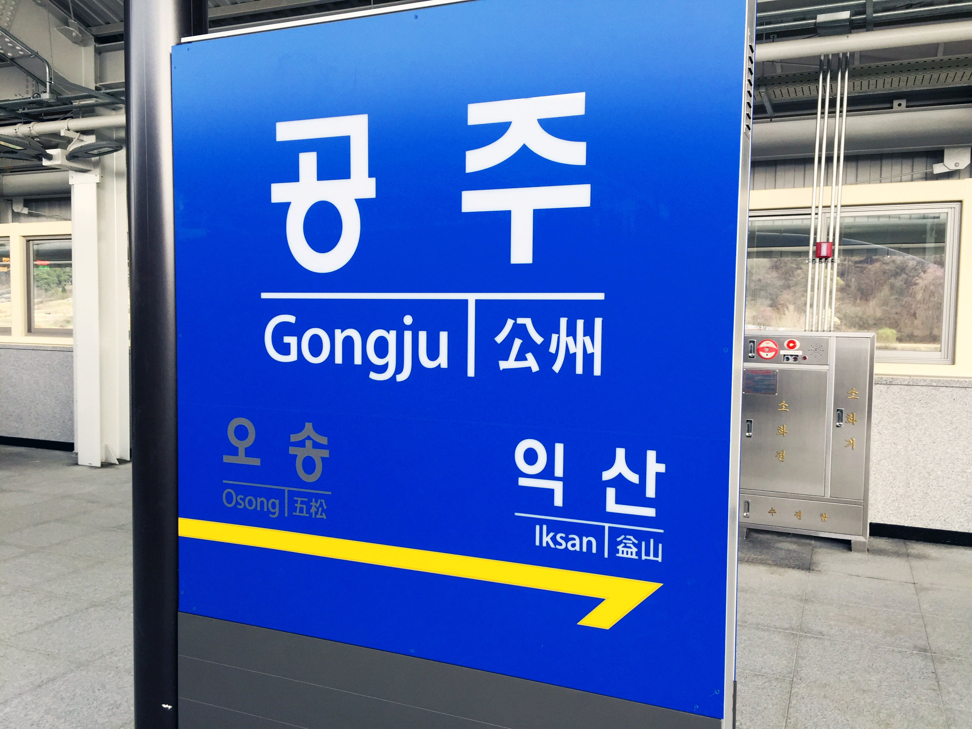 공주역 역명판